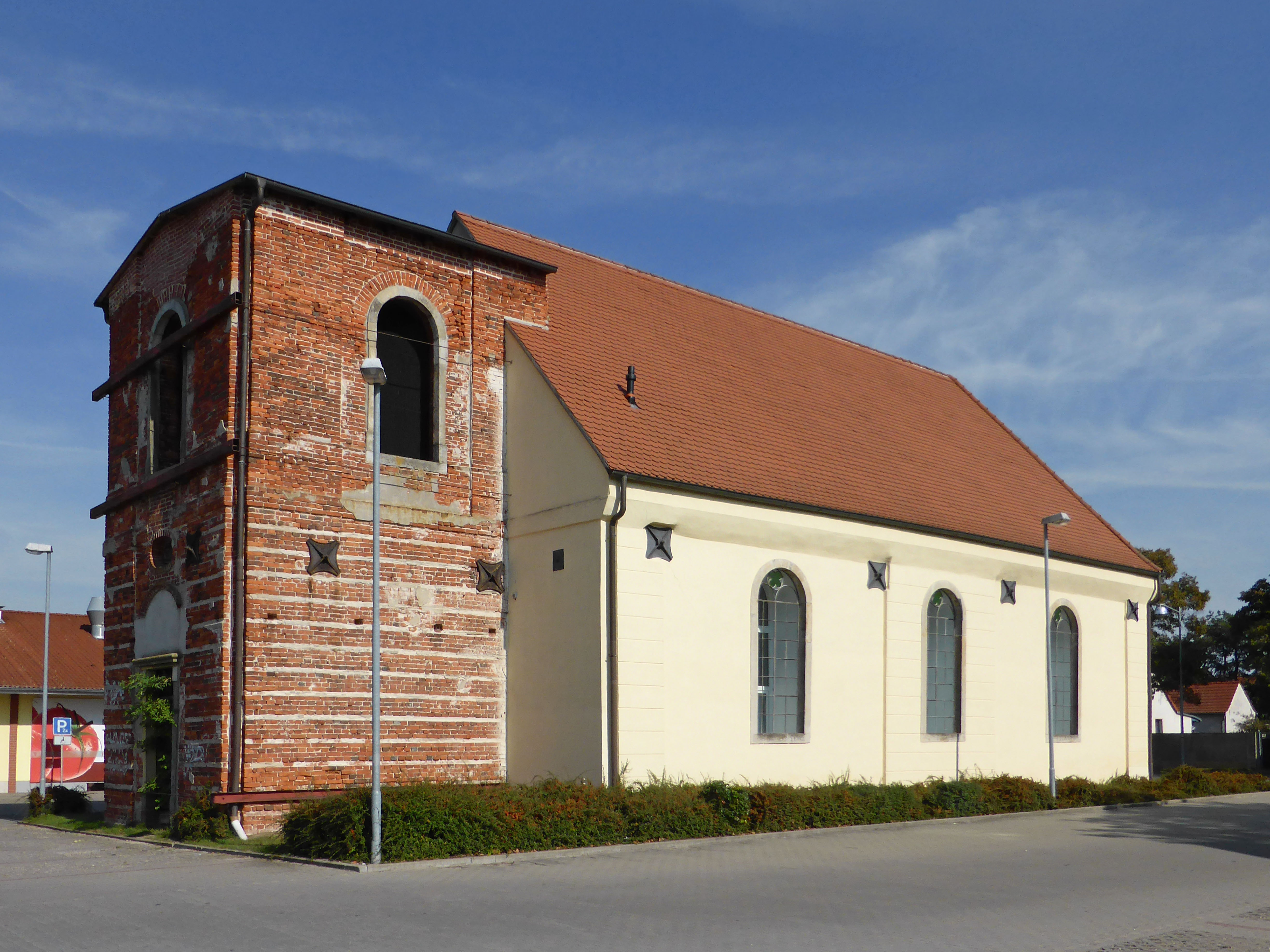 Spakassenfiliale in Millow.